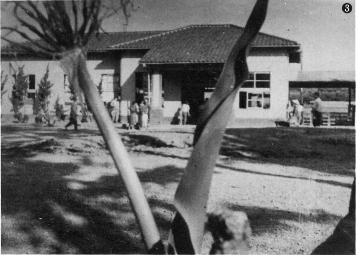 昭和21年頃の紀勢本線阿田和駅。謎の構図。